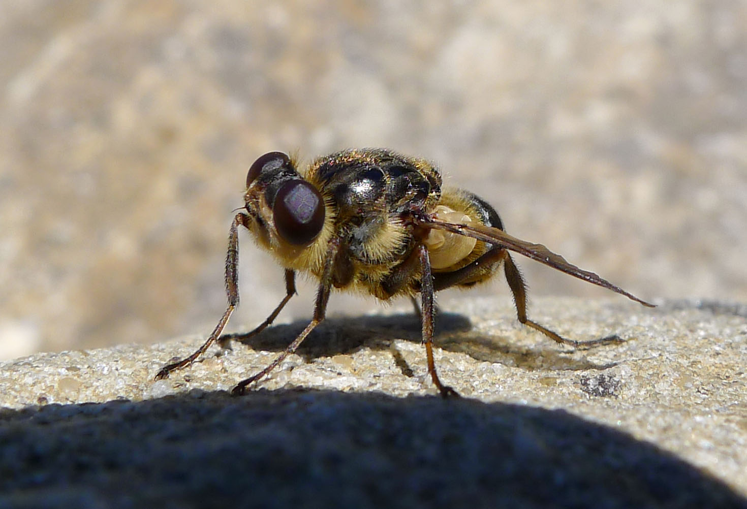 Alconocales N.P. Andalucia Spain